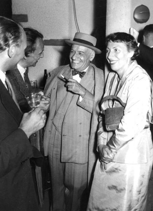 Darmstadt Darmstädter Gespräch